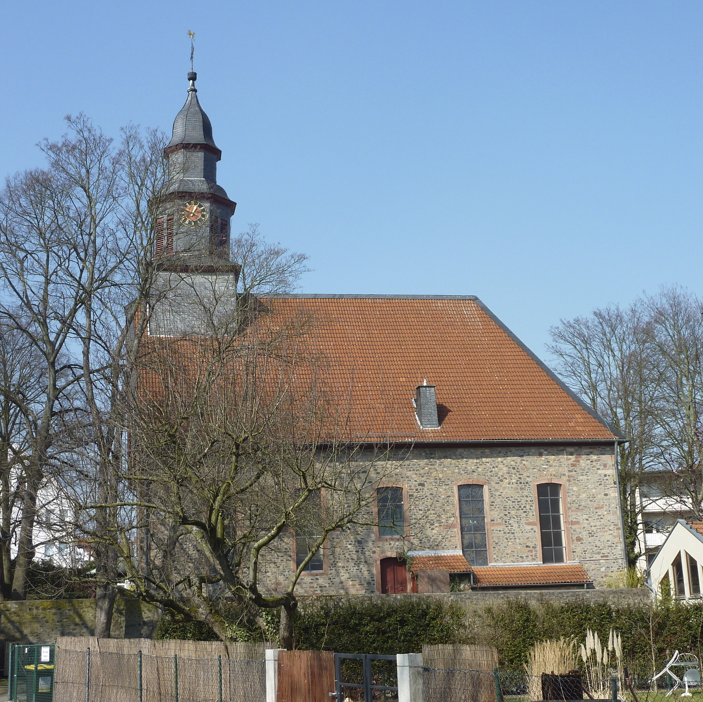 Frankfurt am Main, Stadtteil Praunheim: Die evangelische Auferstehungskirche, eine barocke Saalkirche aus dem 18. Jahrhundert. Die Pfarrkirche im damals selbständigen Dorf Praunheim wurde von 1770 bis 1773 anstelle eines durch Brand zerstörten Vorgängerbaues errichtet. Das Foto zeigt eine Totalansicht der Kirche von Südosten